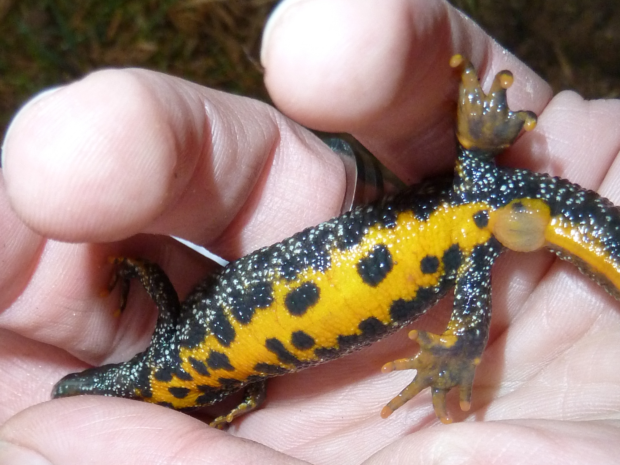 Unteransicht eines weiblichen, nördlichen Kammmolches (Triturus cristatus)